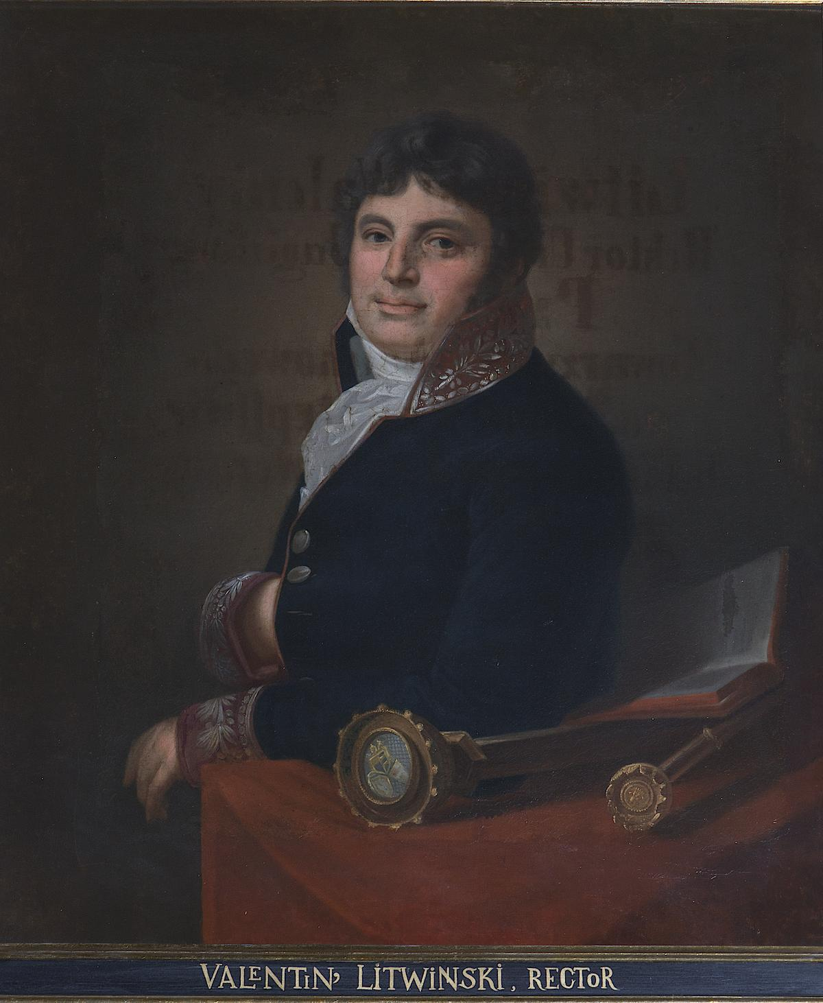 Walenty Litwiński profesor nauk prawnych, rektor Uniwersytetu Jagiellońskiego i prezes Towarzystwa Naukowego Krakowskiego